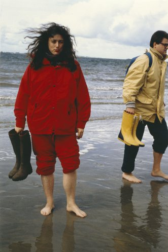 Monika Griefahn als Umweltministerin in Niedersachsen bei einer Ortsbegehung im Watt.